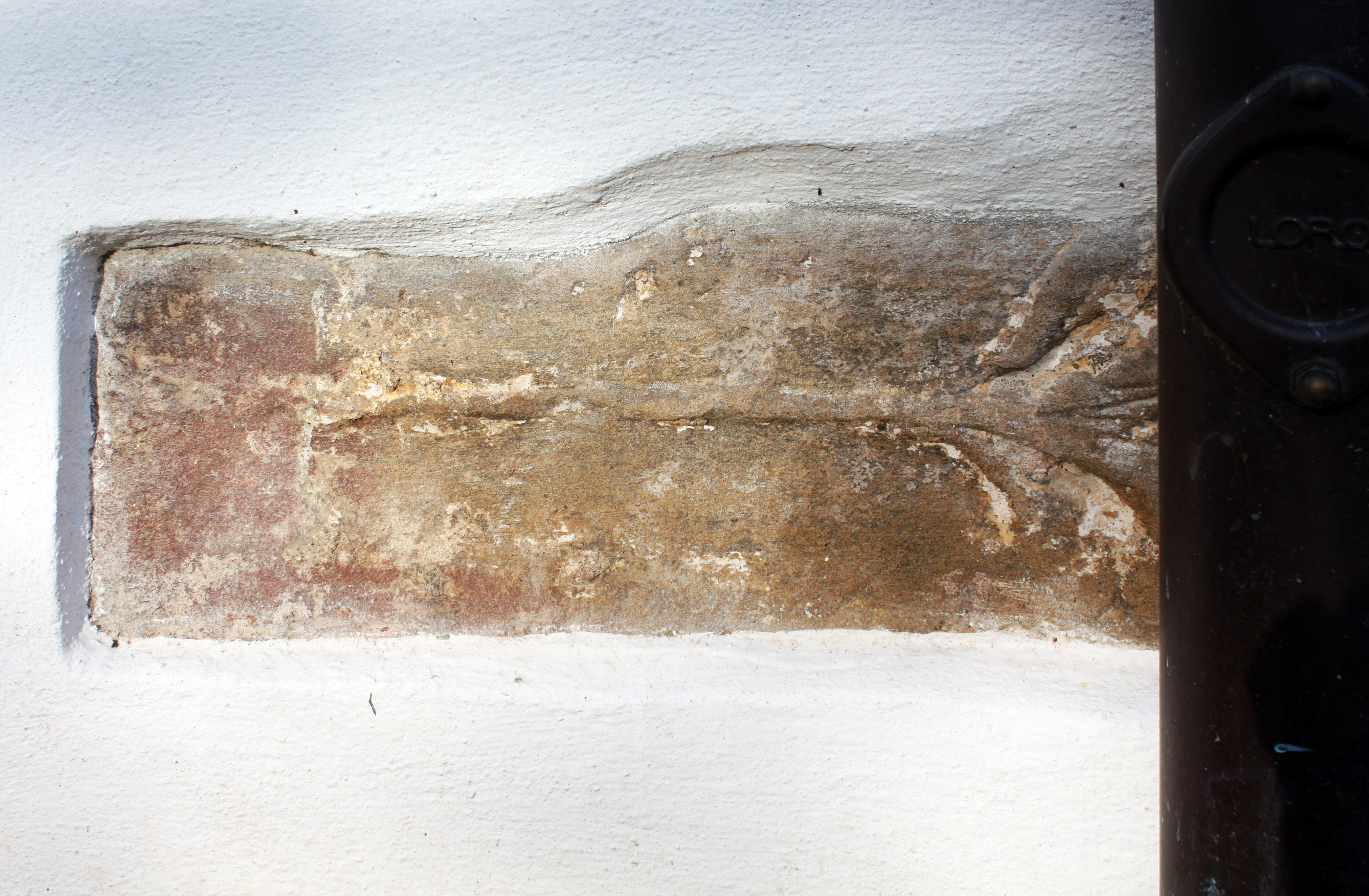 Lechenich, Heddinghoven. St. Servatius Kapelle, vermauerter Matronenstein 2. oder 3. Jahrhundert